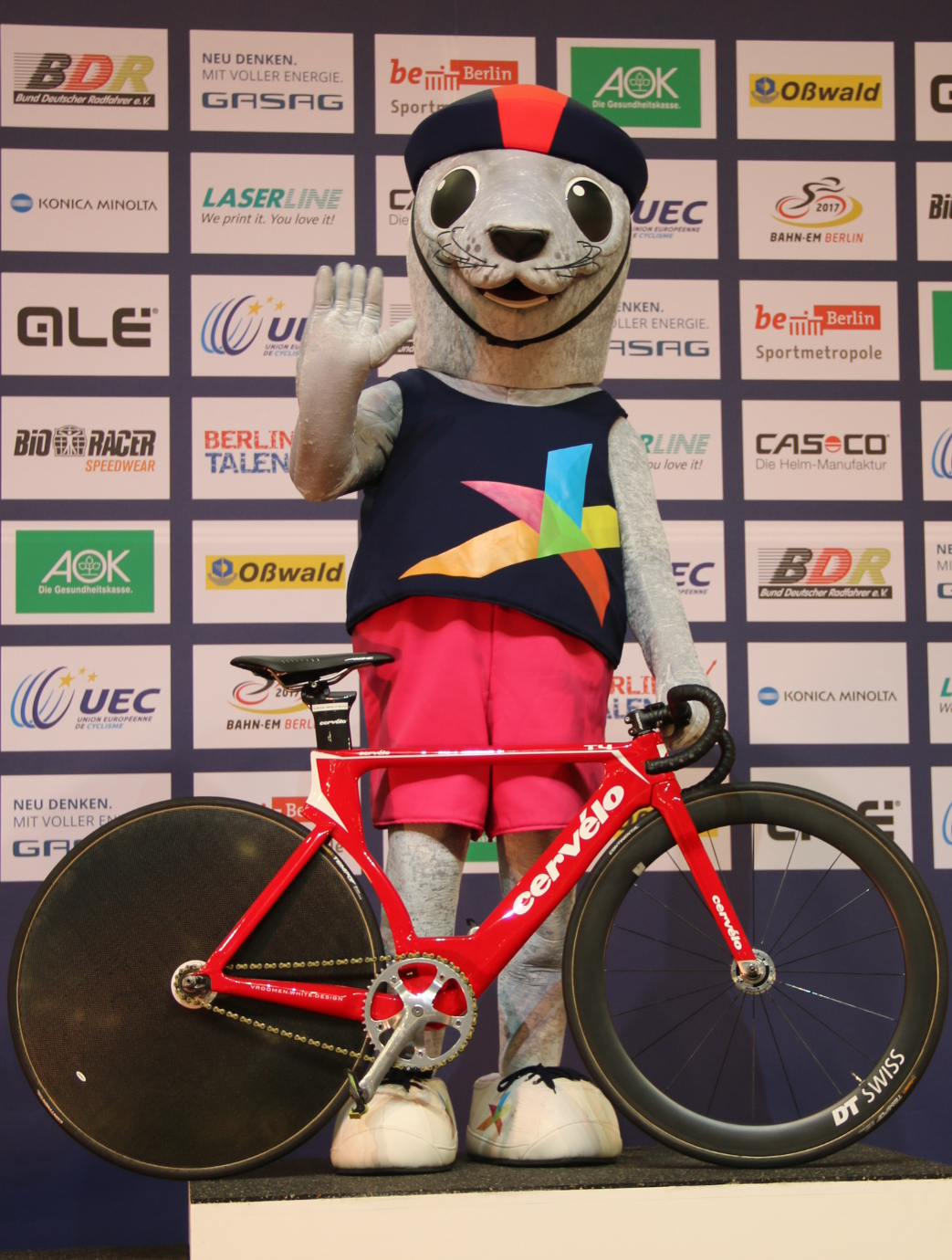 Seehund "Bonnie", Maskottchen der UEC-Bahn-Europameisterschaften 2018 in Glasgow, bei seiner Vorstellung in Berlin